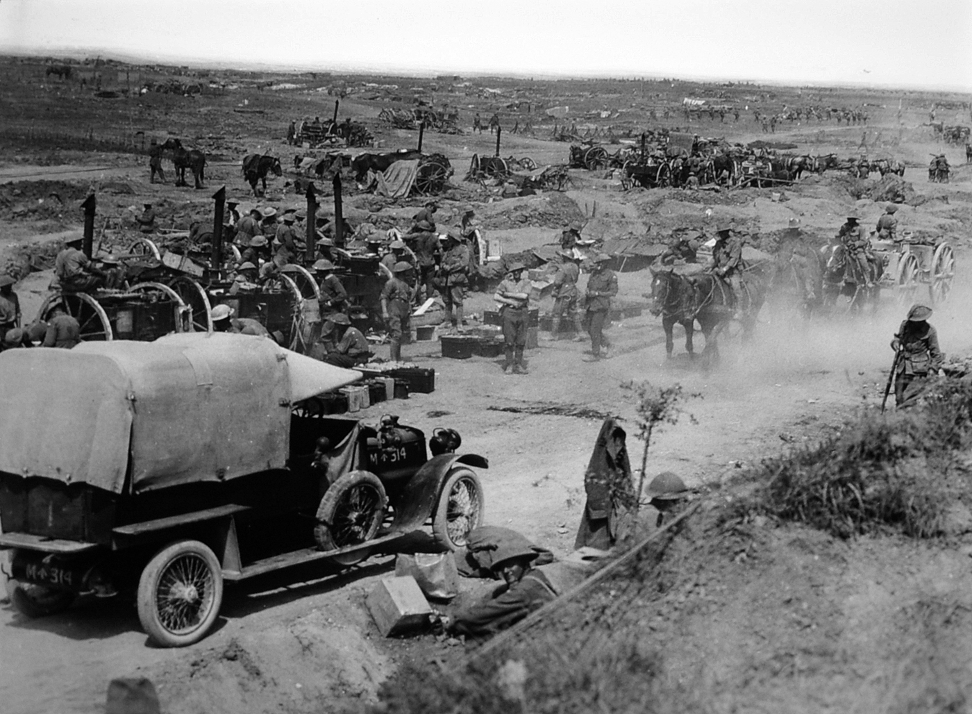 Field kitchens in Somme.